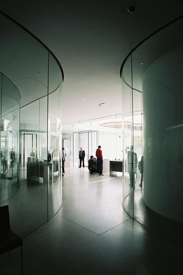 Foto interior donde puede apreciarse el juego con el doble acristalamiento